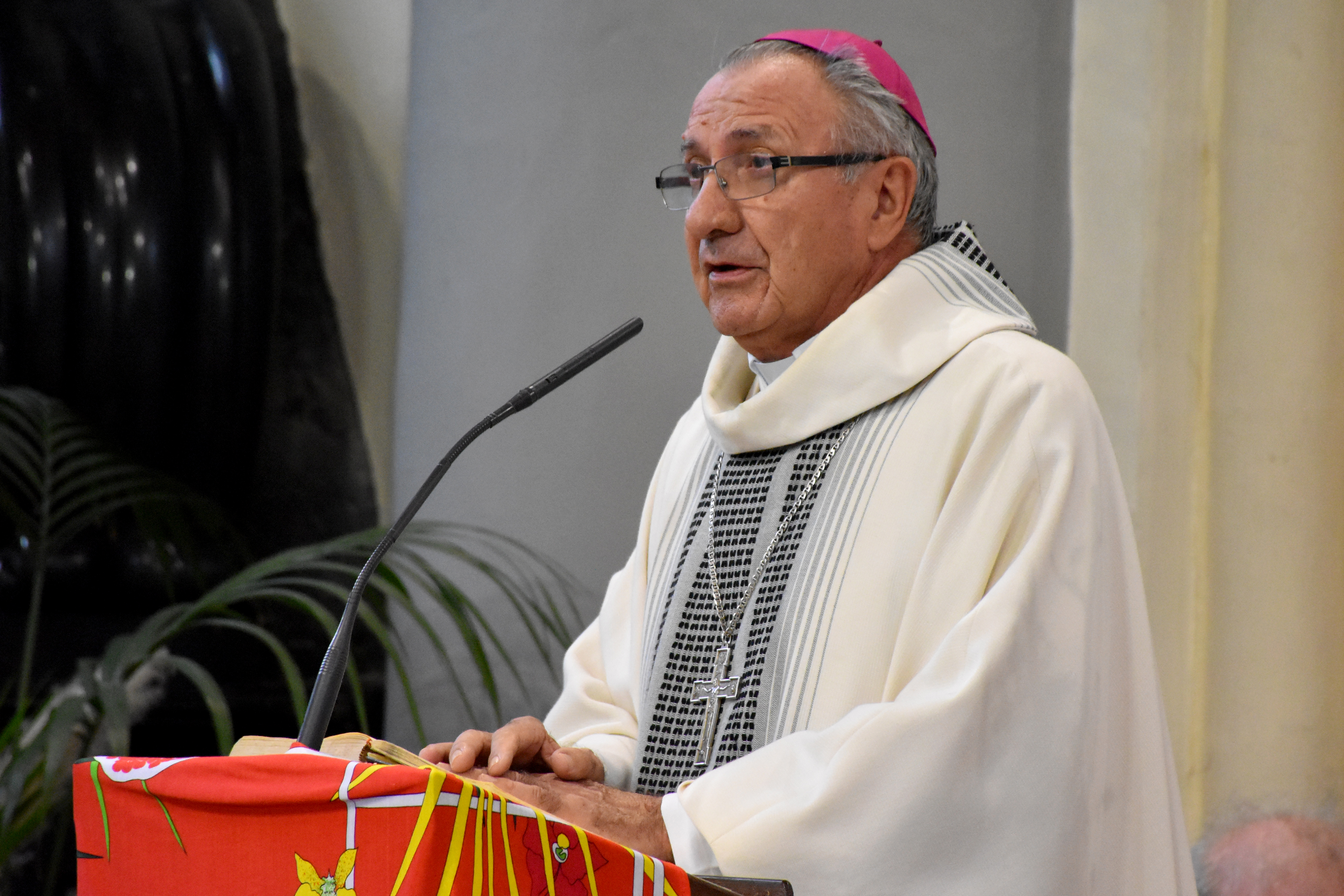 André De Witte tijdens de homilie in de parochiekerk van Scheldewindeke, Oost-Vlaanderen, België.